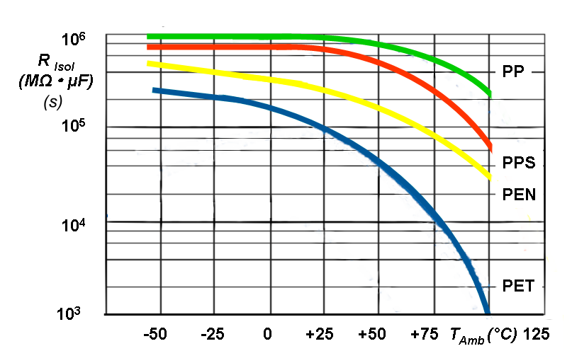 Isolationswiderstände von Folkos in Abhängigkeit von der Temperatur